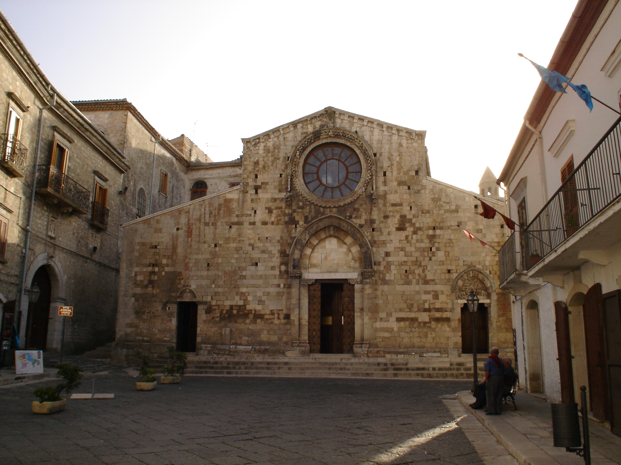 Il Duomo di Bovino. Il Duomo di Bovino, concattredale della diocesi. Sicilianu: Duomu di Buvinu.